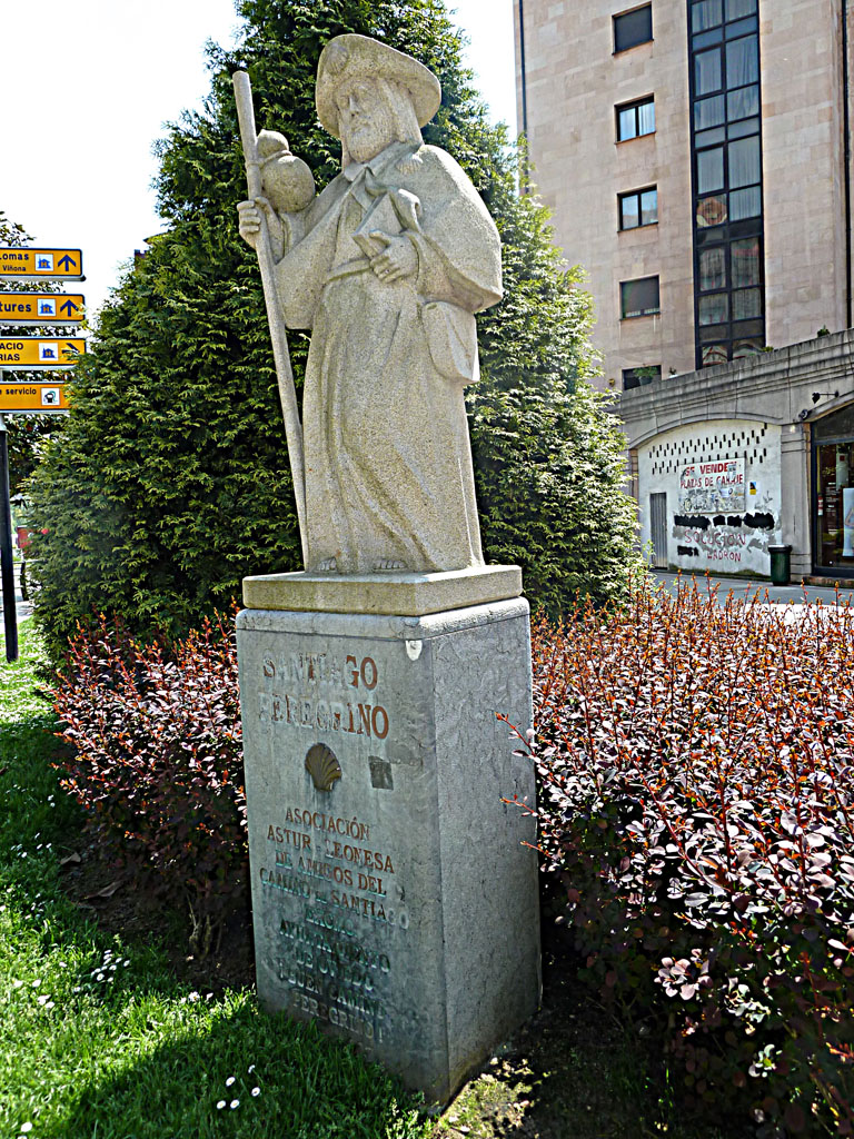 Muñóz Degraín. Oviedo